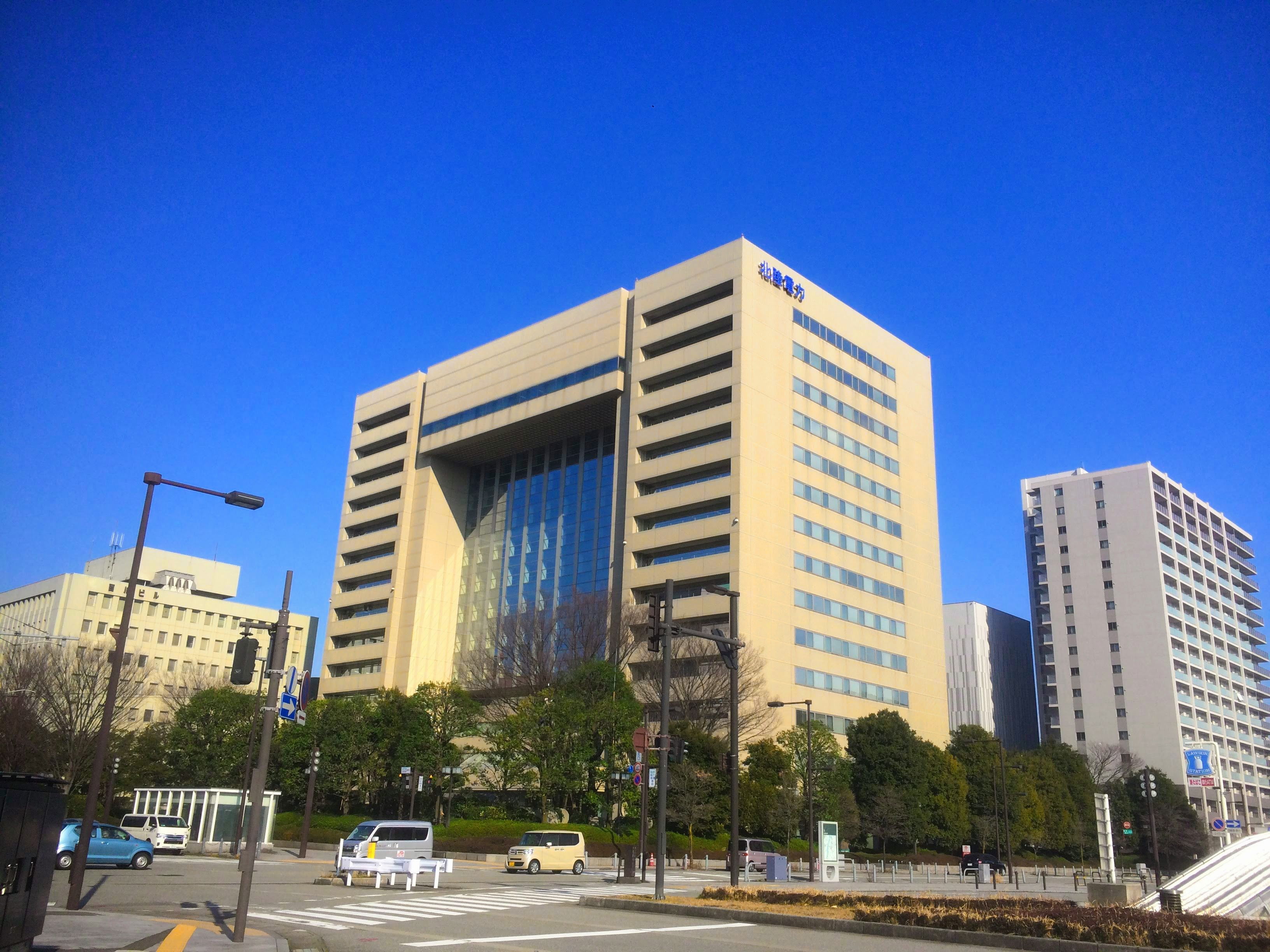 北陸電力の本店ビル